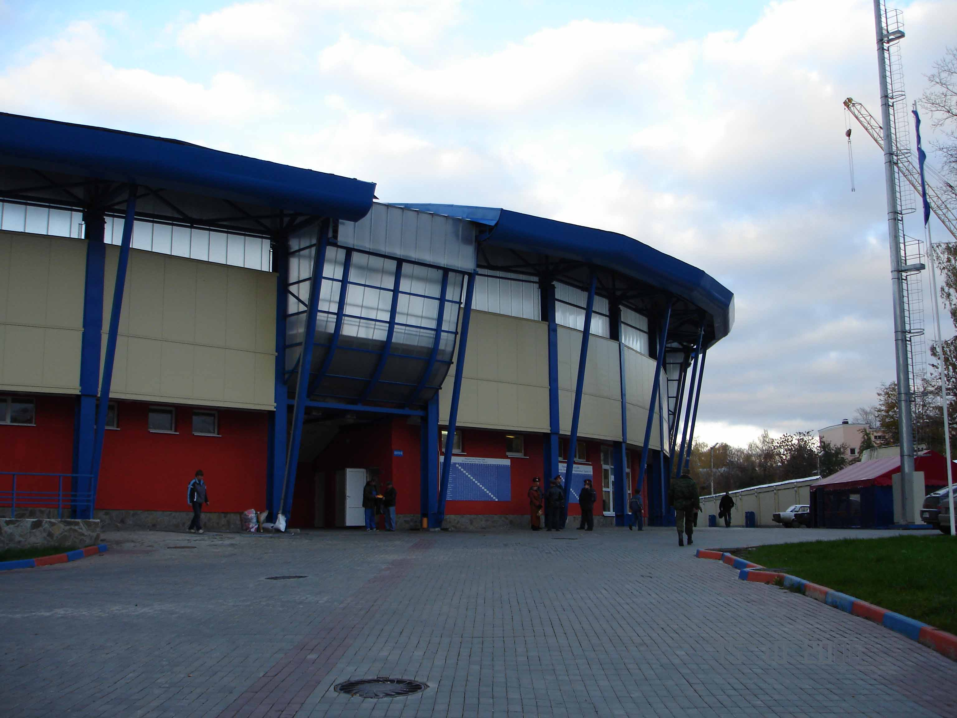 Стадион Труд. Вид снаружи. Серпухов. Стадион Труд.